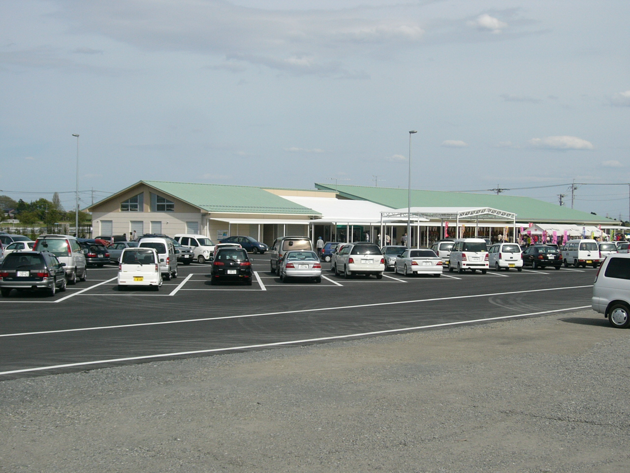 Michinoeki Goka (Ibaraki)(道の駅ごか)